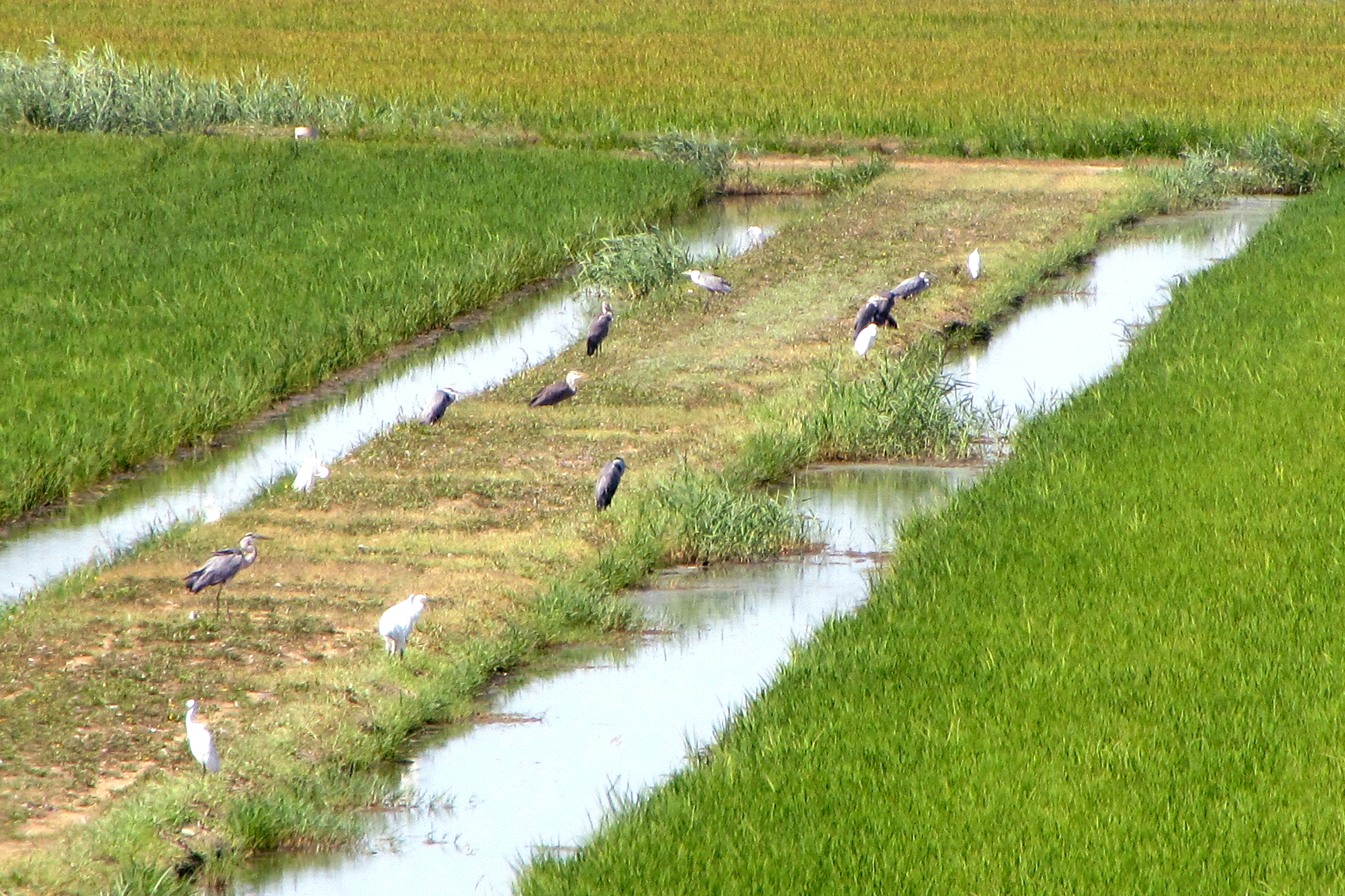 Aironi cenerini (Ardea cinerea)) e garzette (Egretta garzetta) in una risaia al Parco Naturale del Delta del Po'